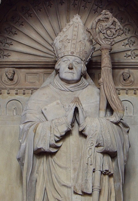 Trierer Dom, linkes Seitenschiff, Grabdenkmal Johann von Metzenhausen